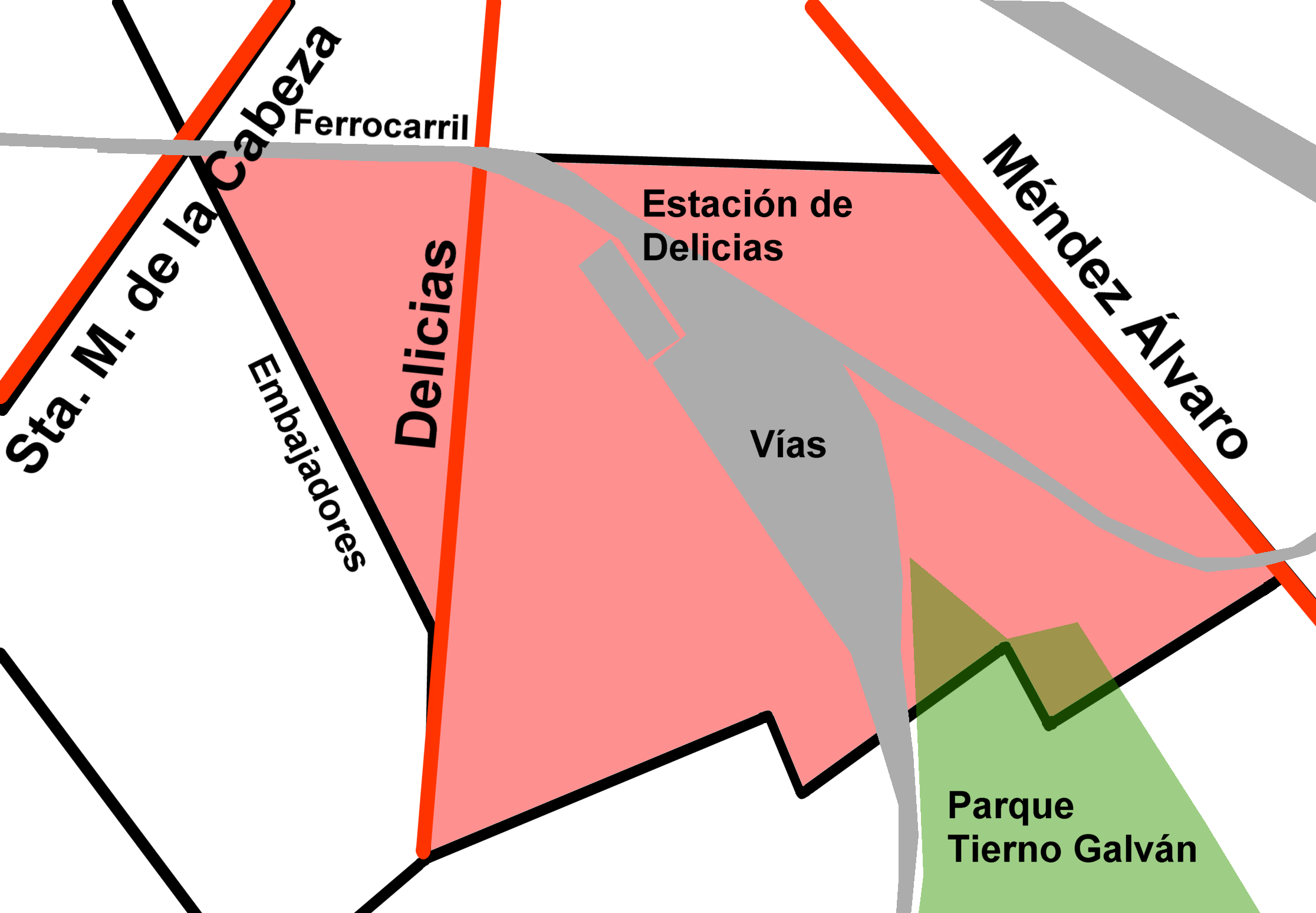 Esquema del barrio de Delicias. Arganzuela. Madrid. España